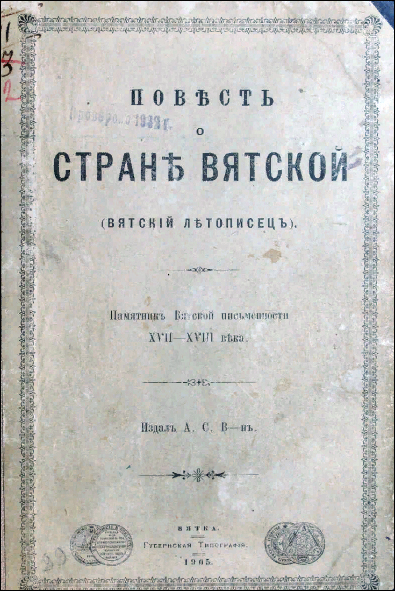 "Повесть о стране вятской", анонимная летопись 17-18 вв.